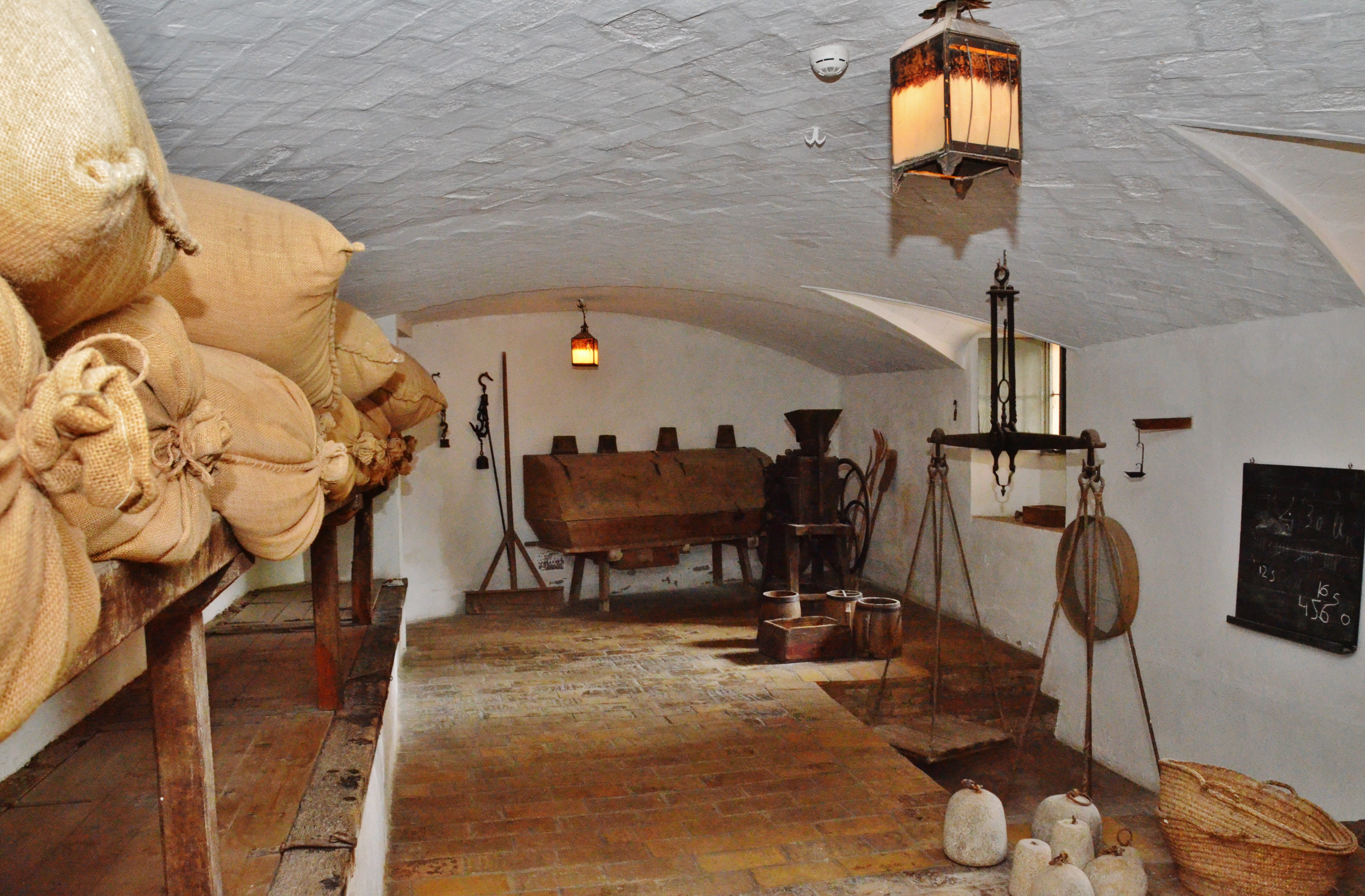 Graner del Museu Romàntic Can Papiol de Vilanova i la Geltrú.